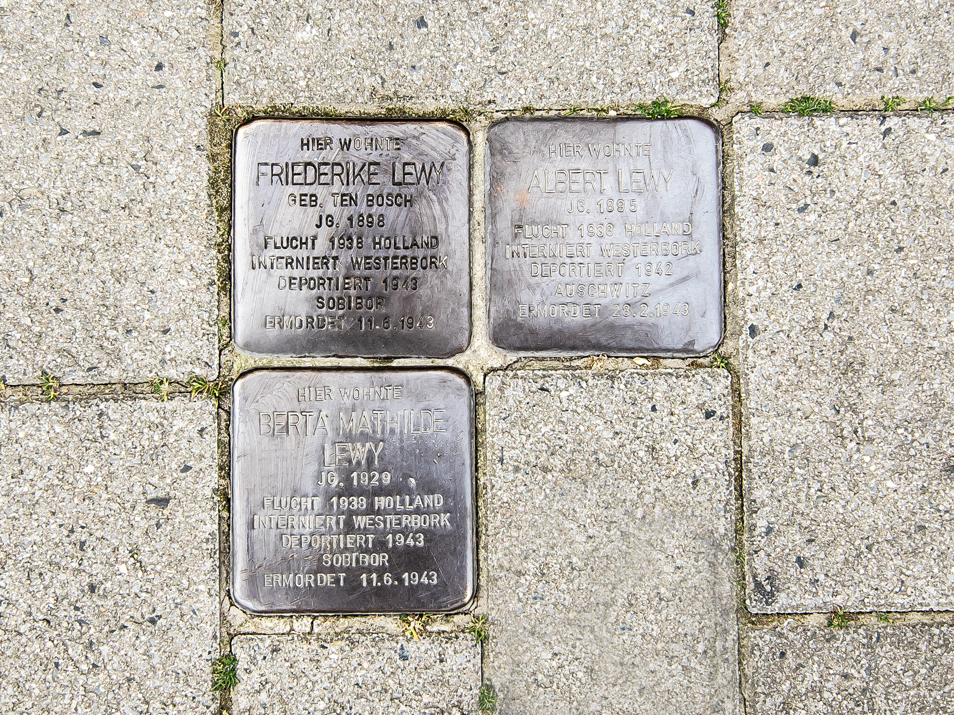 Stolpersteine Albert Berta Friederike-Lewy in Dortmund